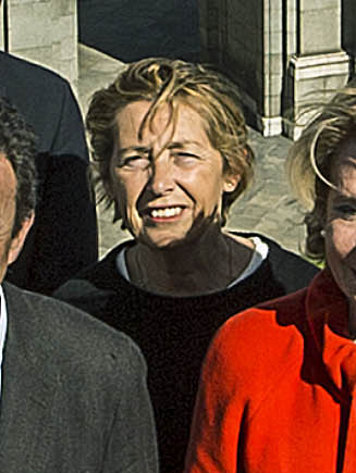 Presentación de la candidatura del Partido Popular al ayuntamiento de Madrid para las municipales de 2015